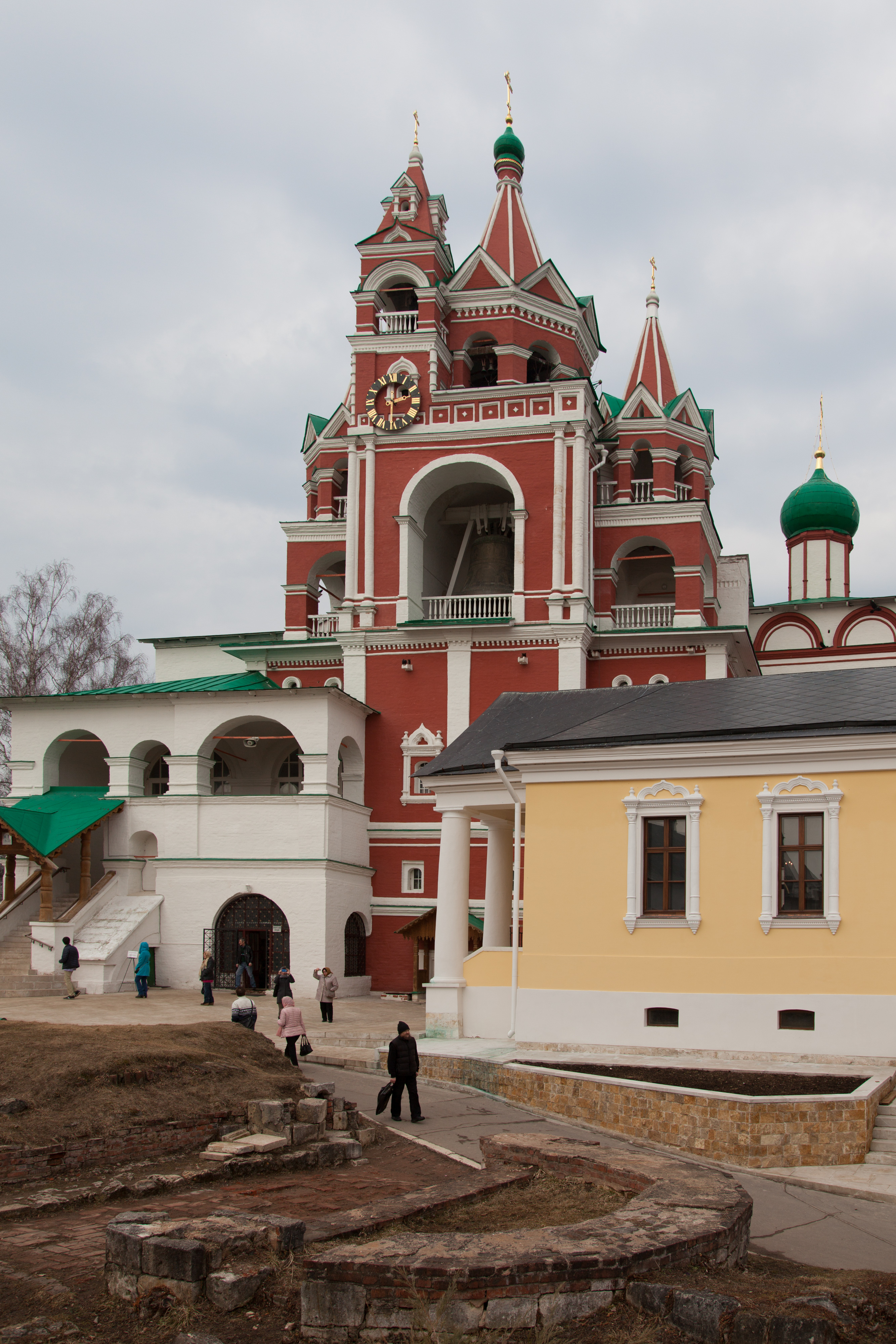 Колокольня (звонница) с церковью Сергия Радонежского (Москва и Московская область, Звенигород, Саввинская слобода)